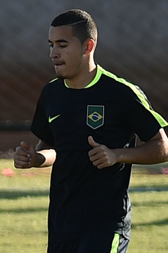 Estádio Maria de Lourdes Abadia (Abadião), Ceilândia, Brasília, DF, Brasil 6/8/2016 Foto: Andre Borges/Agência Brasília. Neste sábado (6), das 16 às 17 horas, a seleção brasileira masculina de futebol treinou no Estádio Maria de Lourdes Abadia (Abadião), em Ceilândia. O treino foi aberto somente para a imprensa.